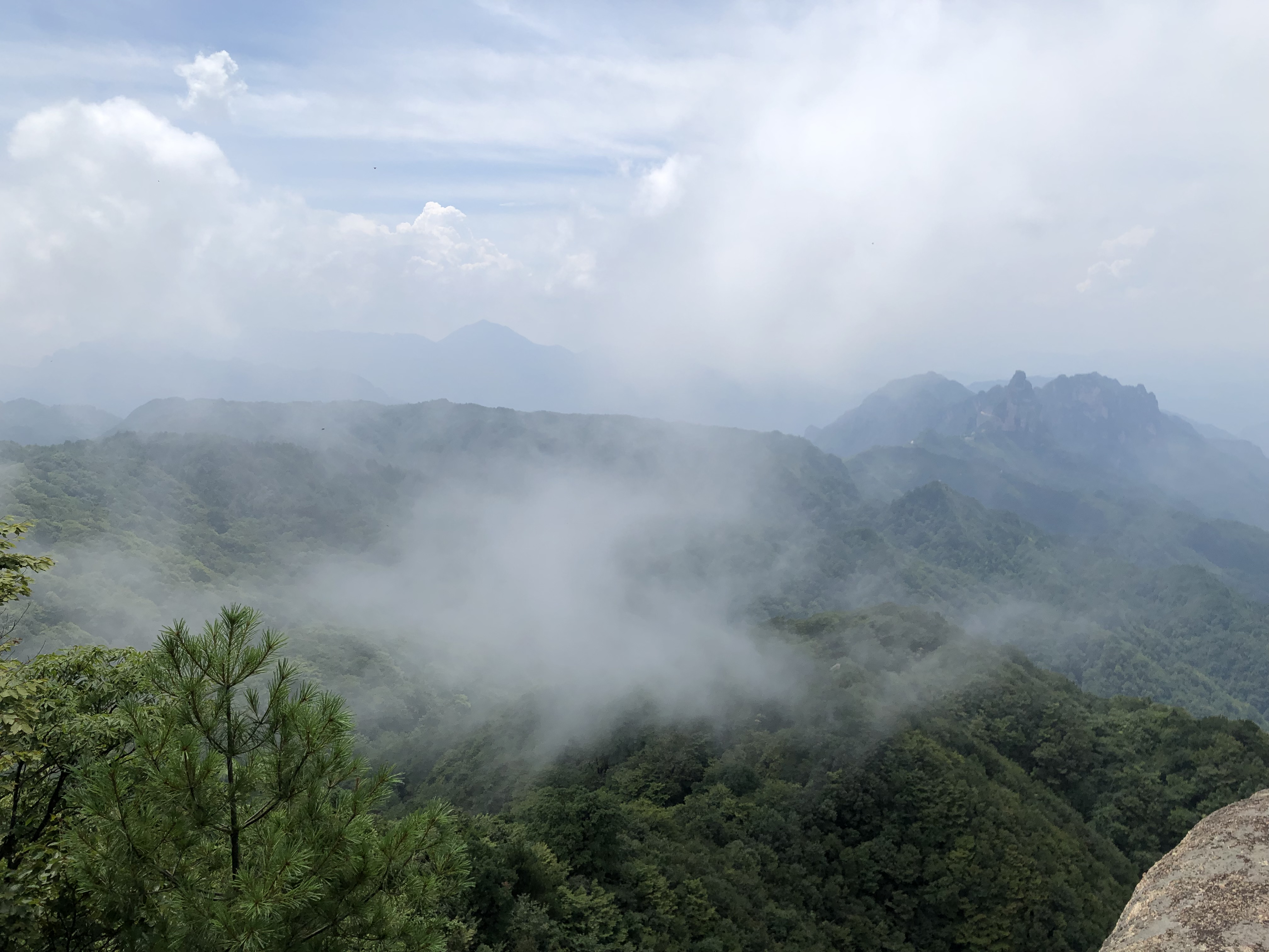 中文（中国大陆）: 大老岭三峡云顶